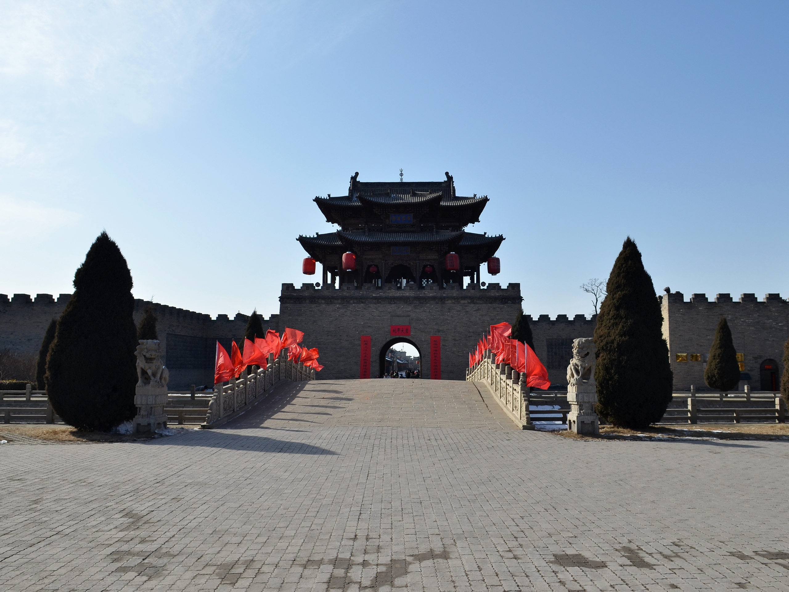 中文（中国大陆）: 山西晋中市榆次常家庄园的东艮吉堡门